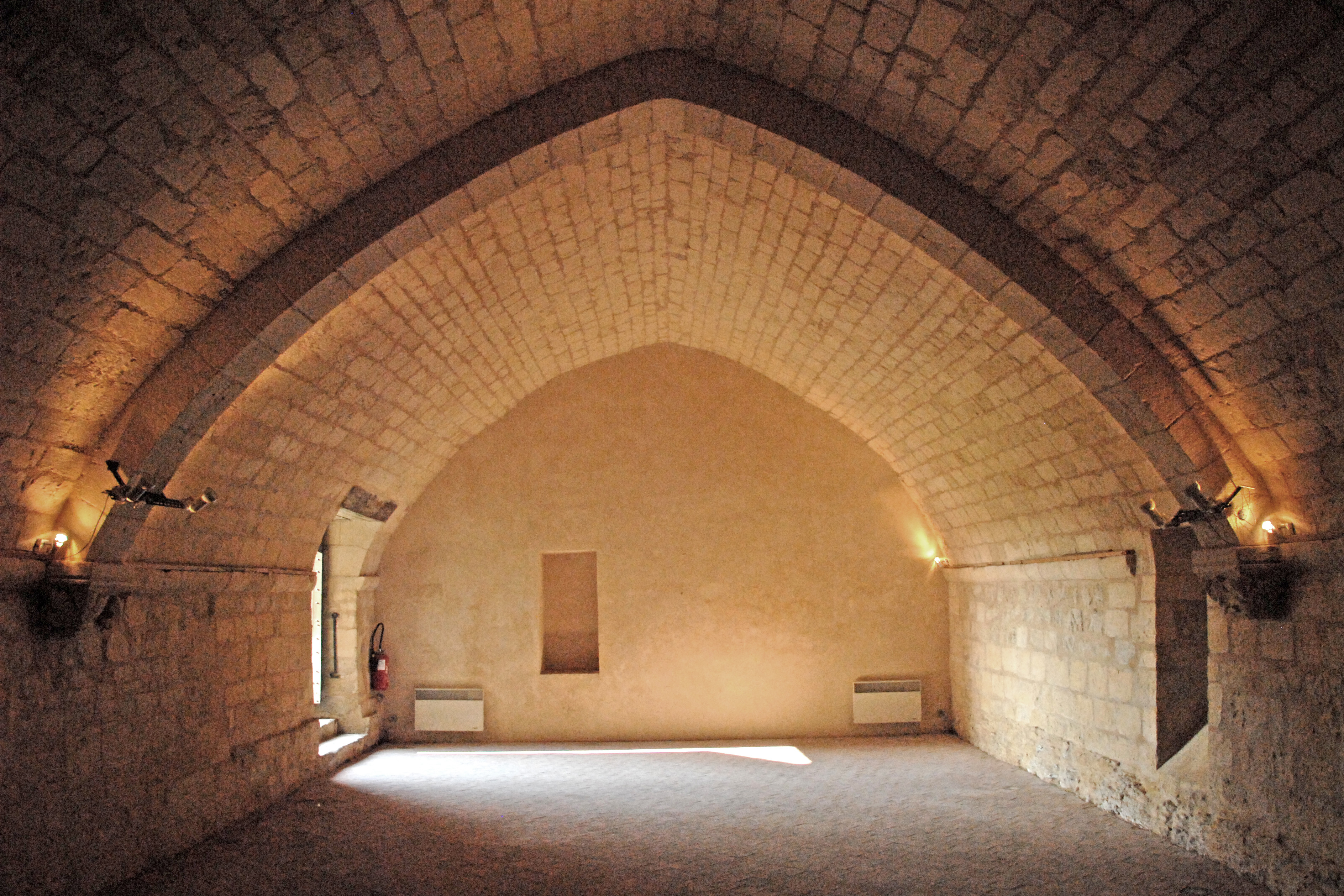 Abtei Trizay, Vorratsraum, angespitztes Gewölbe